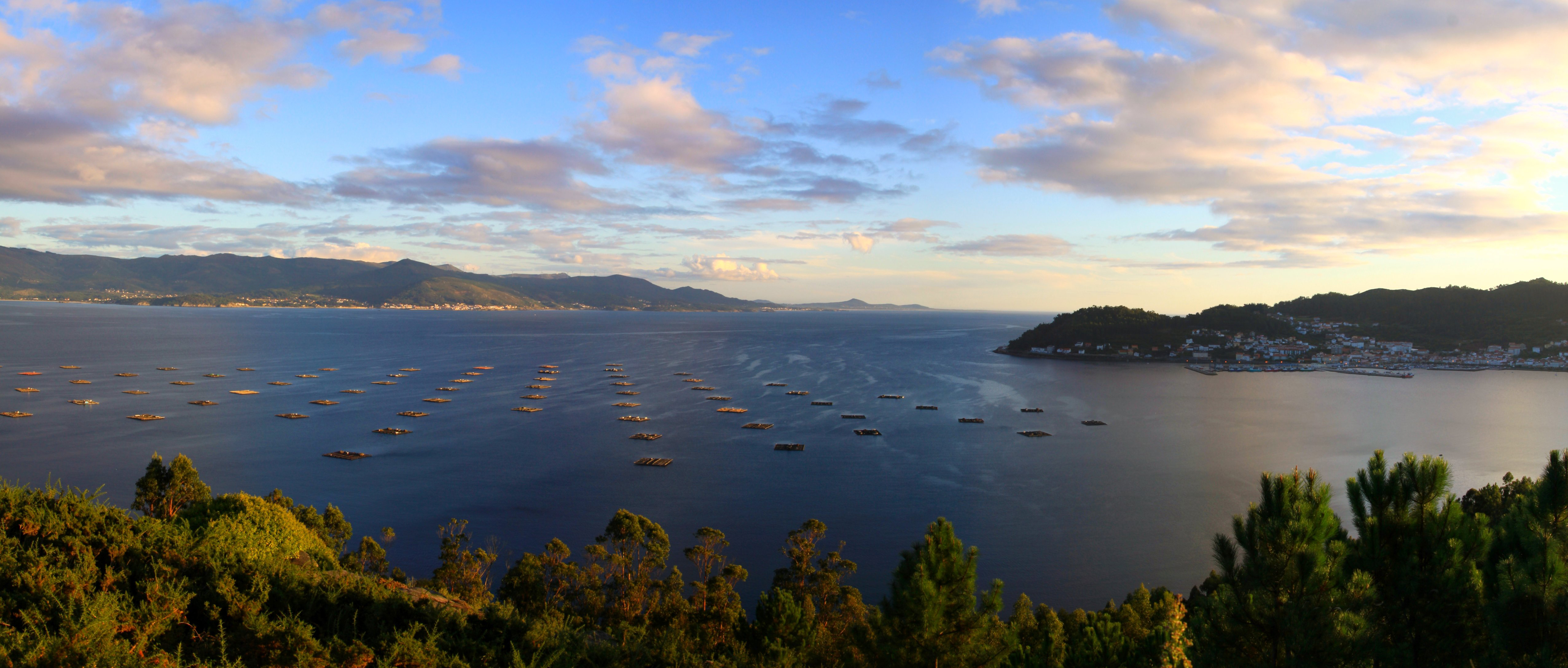 Ría de MUROS. Serres, Muros, Galiza.